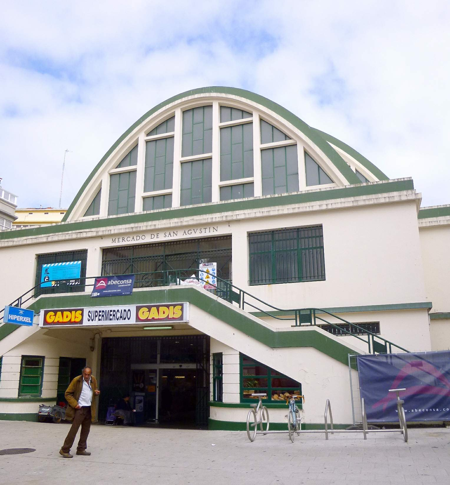 A Coruña - Mercado de San Agustín